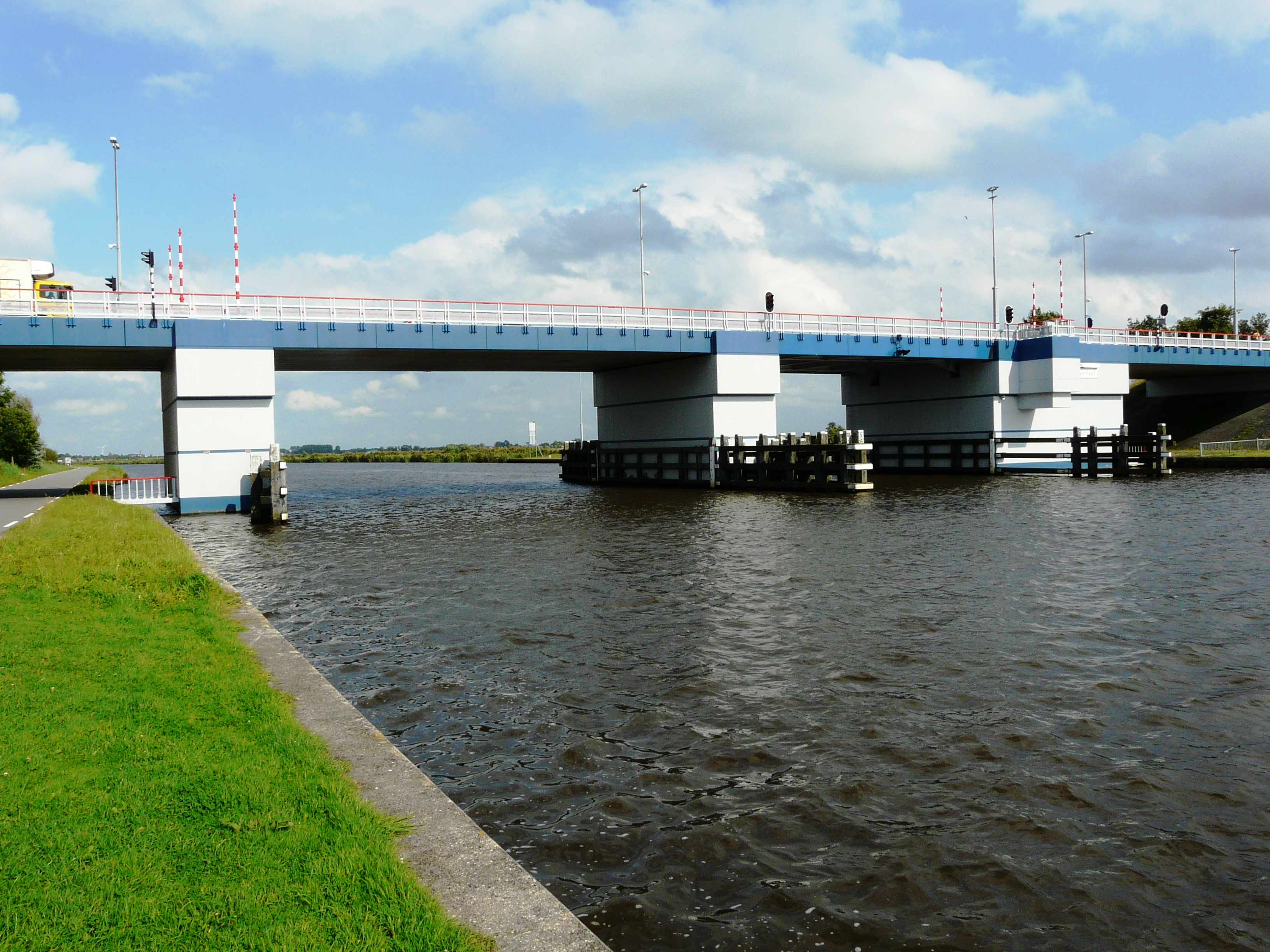 Blauferlaat, brêge oer Pr. Margrietkanaal